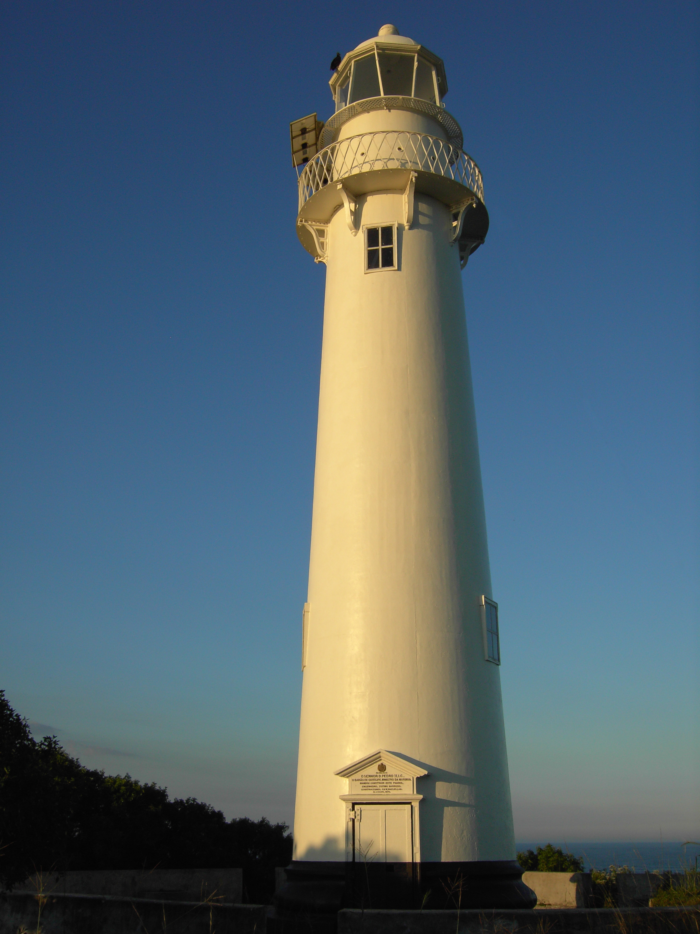 Farol das Conchas, Ilha do Mel, Paranaguá-PR, Brasil